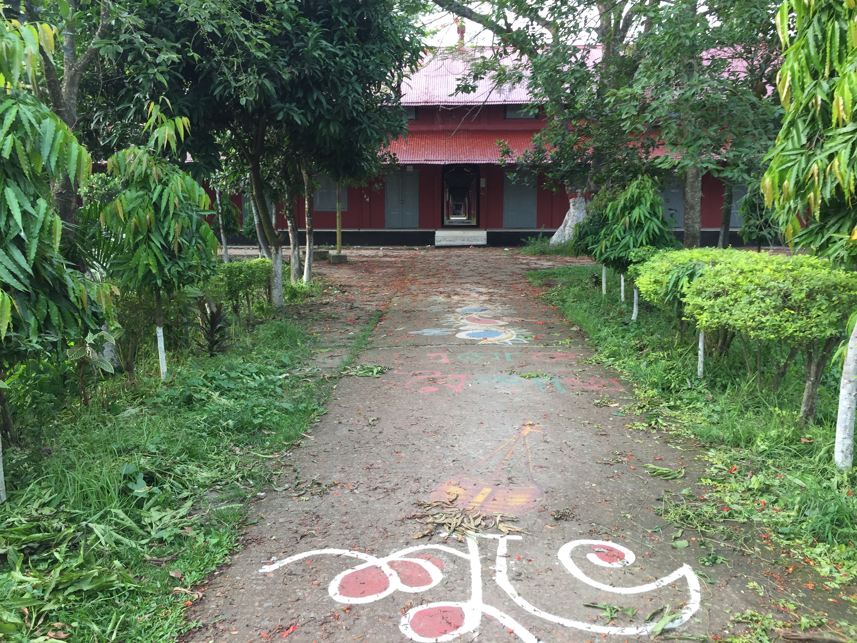 বিদ্যালয়ের প্রধান ফটক থেকে একাডেমিক ভবন